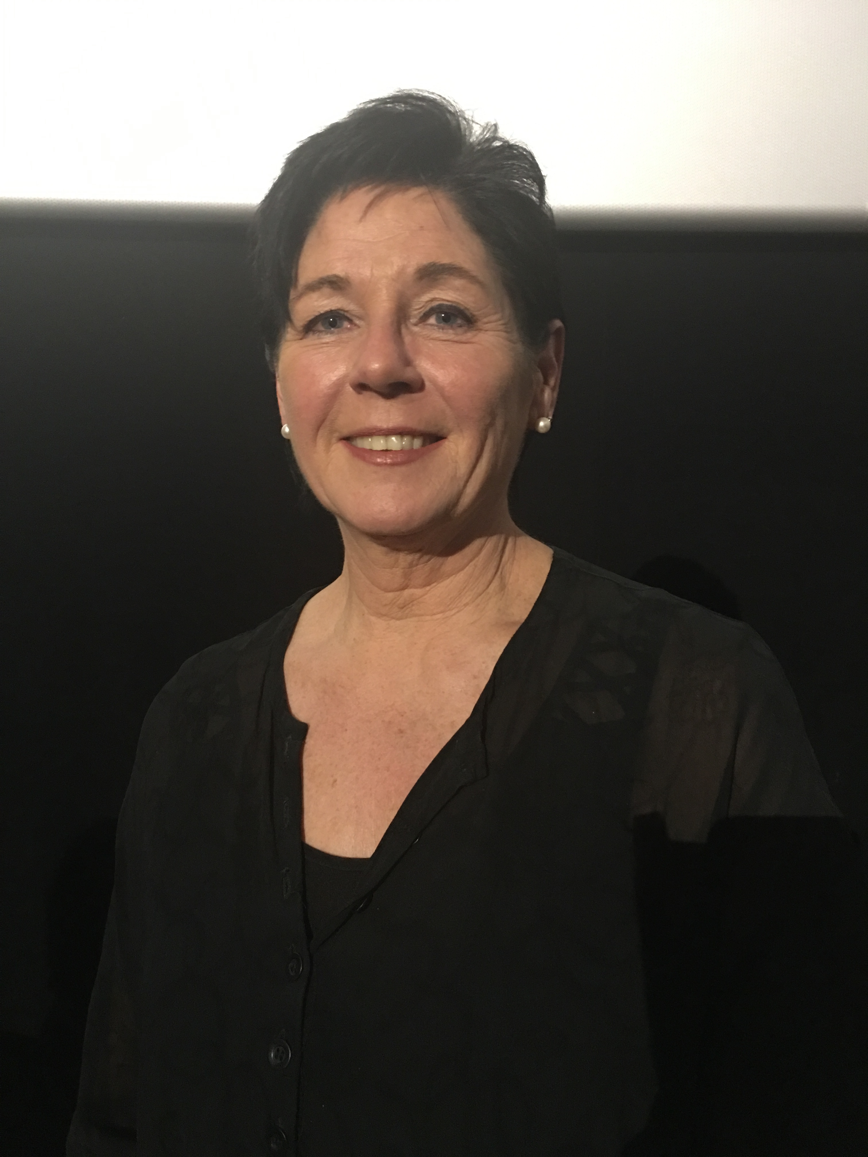 Christiane Jolissaint lors de l'avant-première du film Battle of the Sexes à Genève le 21 novembre 2017.